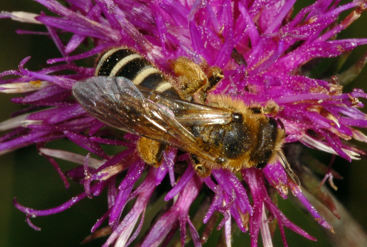 Halictus sexcinctus, Eberstädter Düne, Darmstadt, Hessen, Deutschland